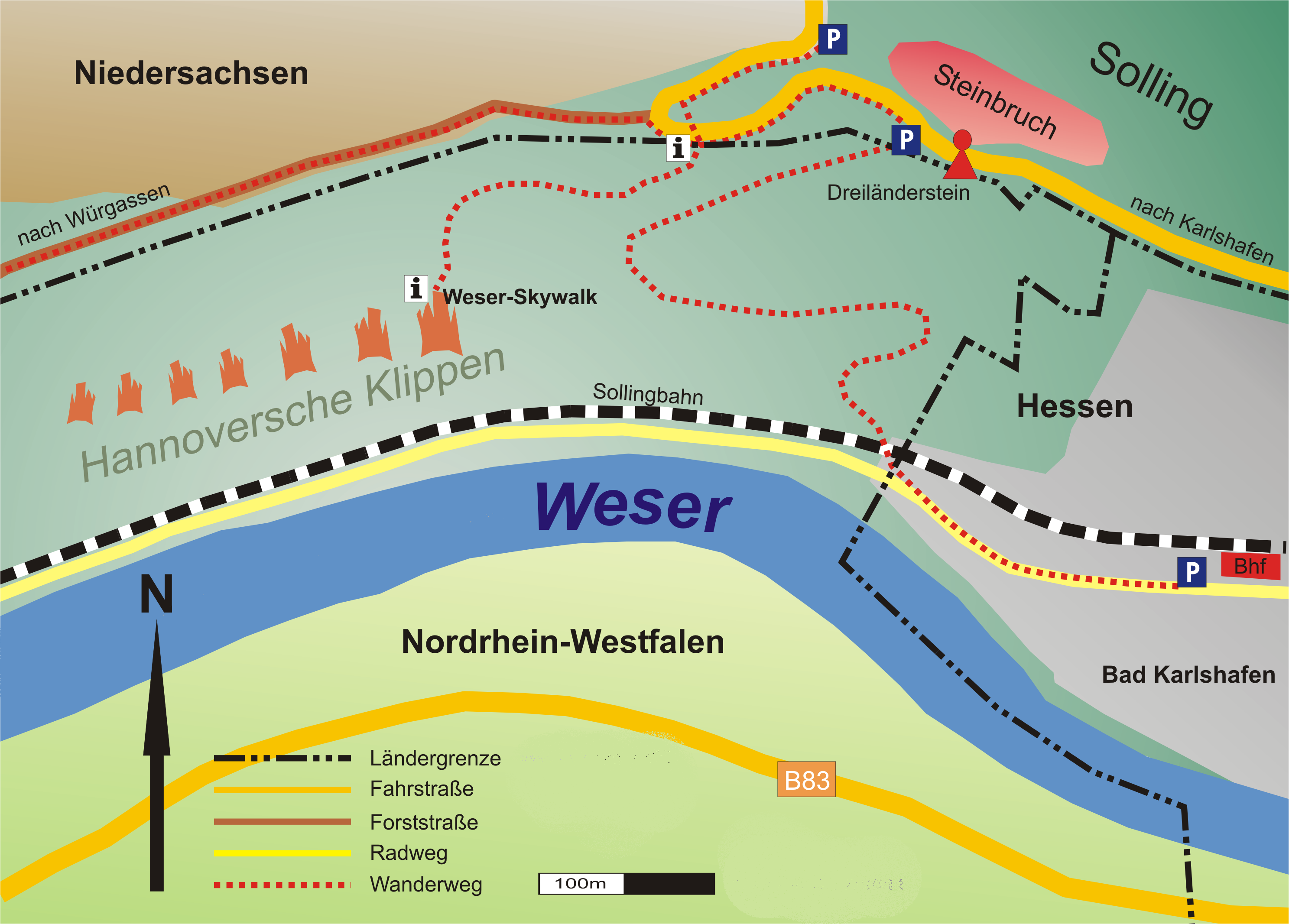 Lageplan der "Hannoverschen Klippen" bei Bad Karlshafen an der Weser am Dreiländereck Hessen, Niedersachsen, Nordrhein-Westfalen